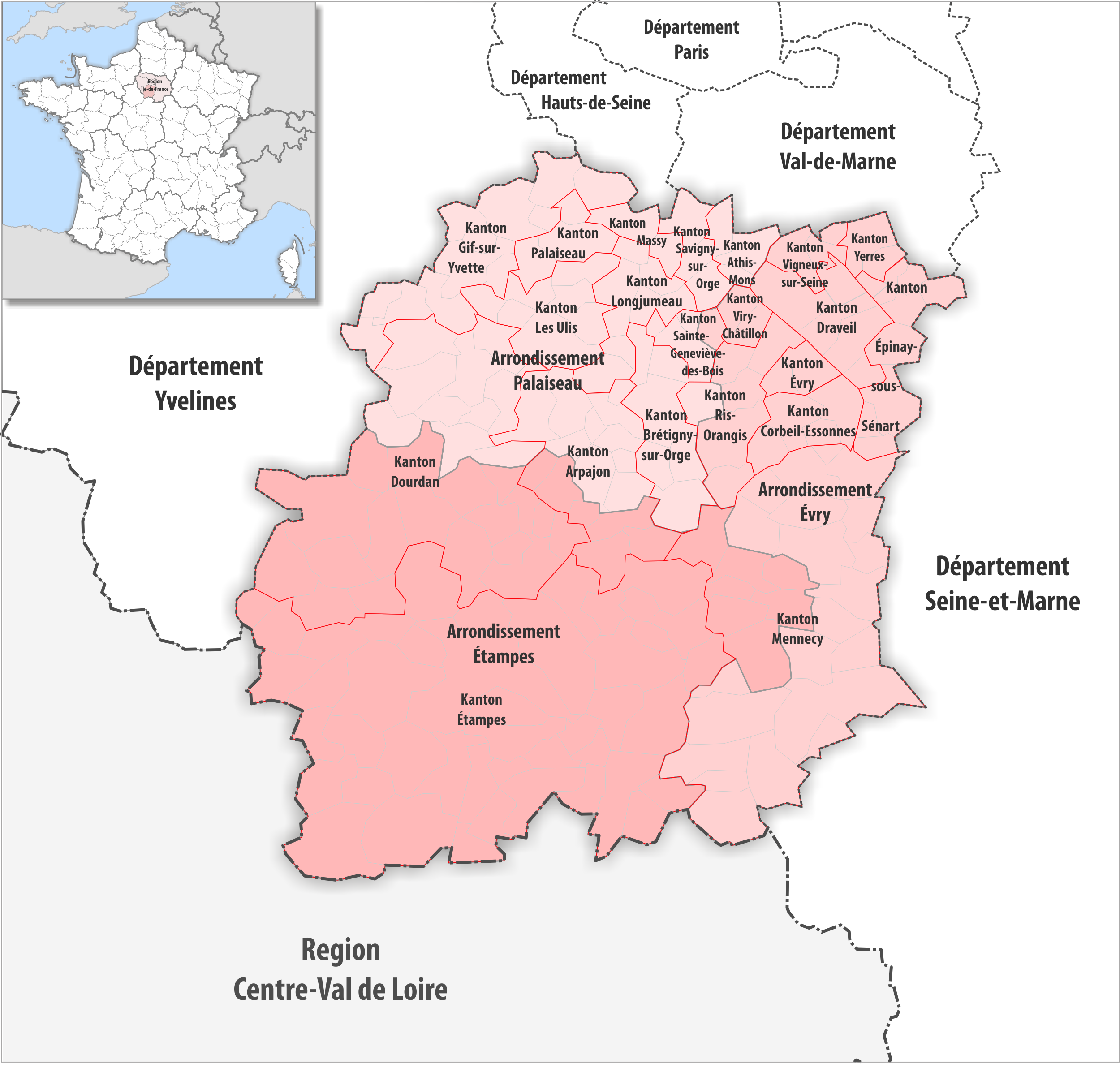 Gemeinden, Kantone und Arrondissemente im Departement Essonne